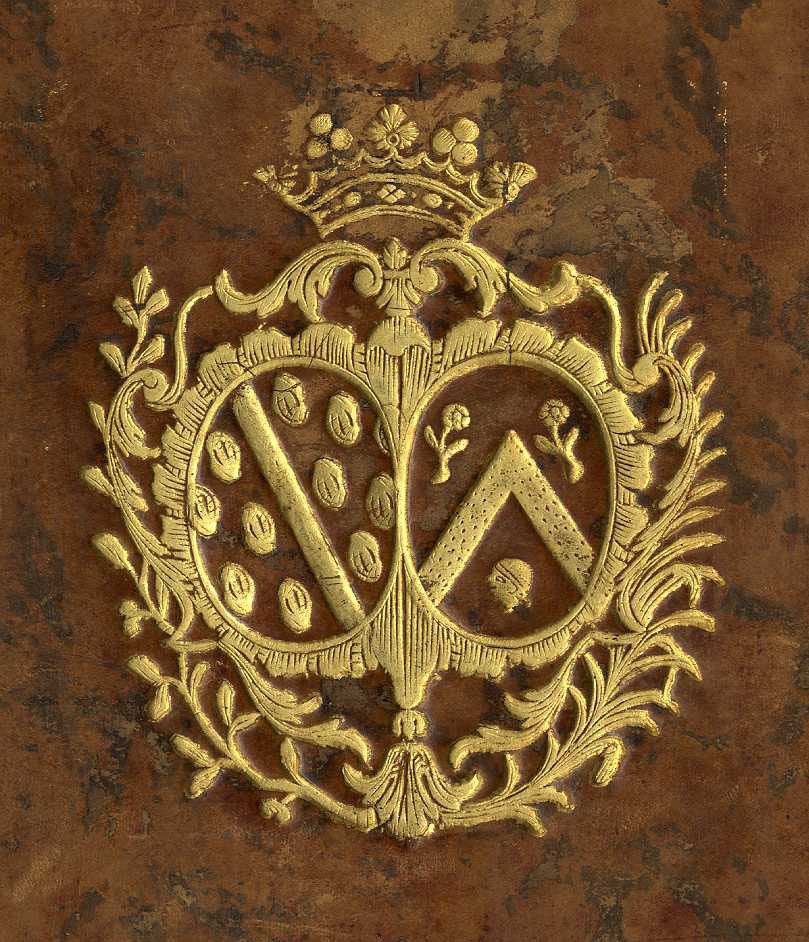 Reliure armoriée. Armes de François-Marie Peyrenc de Moras, contrôleur général des Finances puis secrétaire d'état à la Marine, et de sa femme Marie-Jeanne-Catherine Moreau de Séchelles